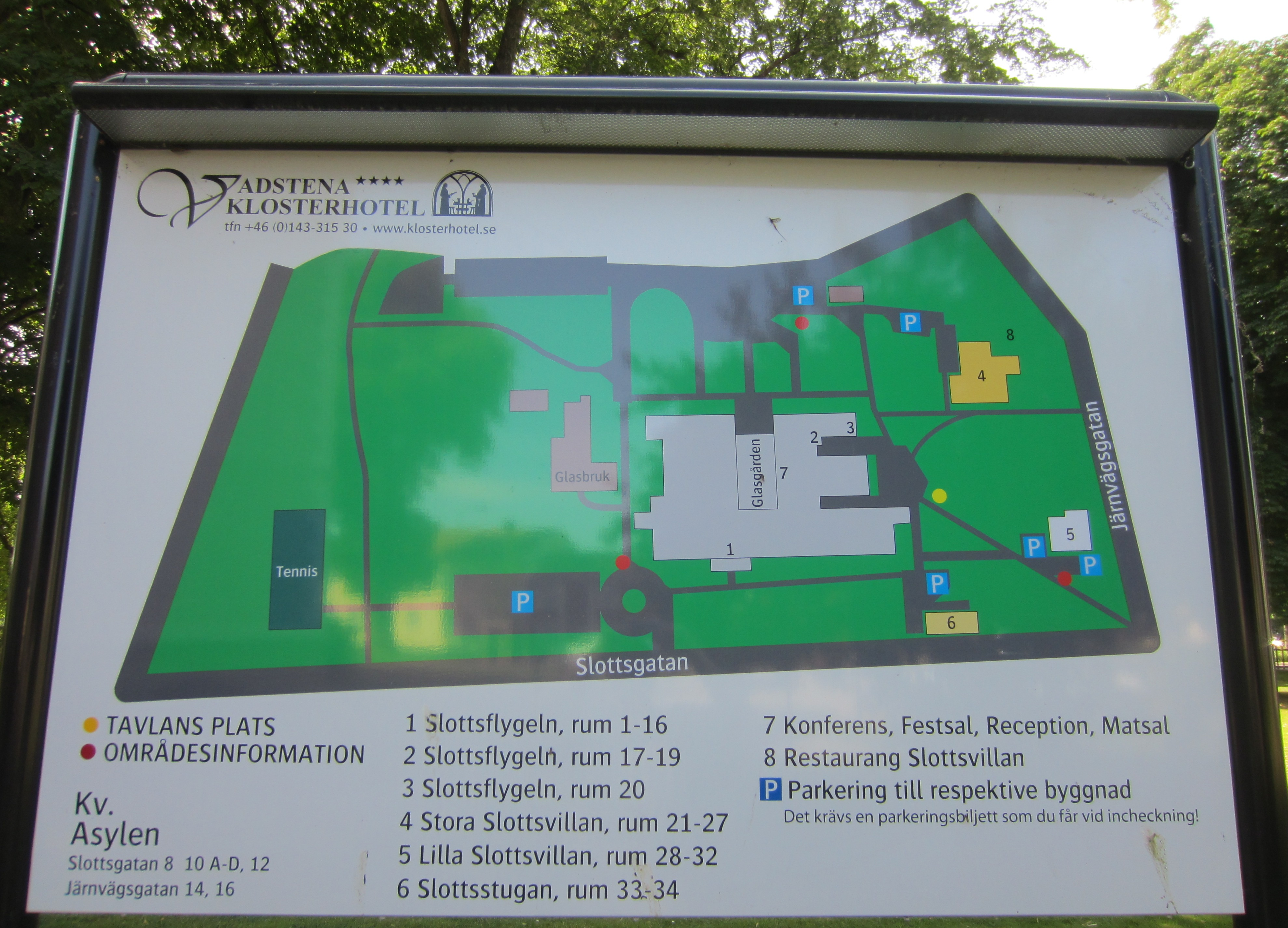 Kartan visar den redan tillräckligt bebyggda Slottsträdgården i Vadstena.